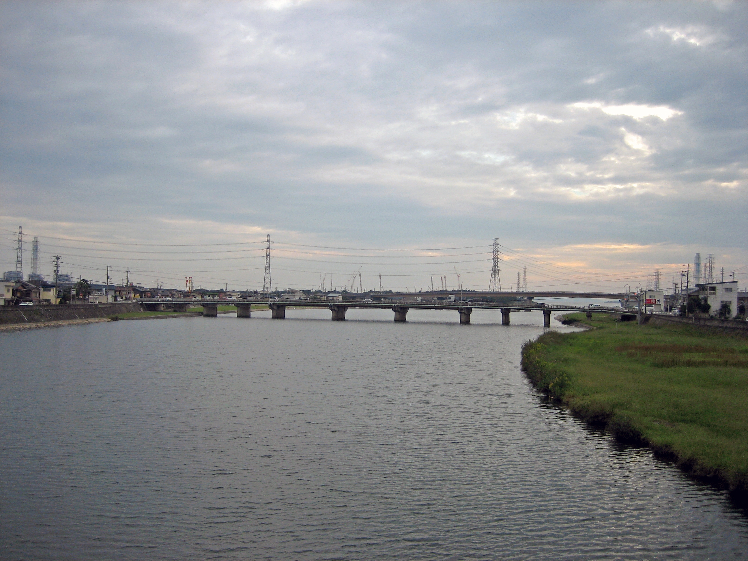 市川下流。妻鹿駅前の歩道橋より南側を撮影。